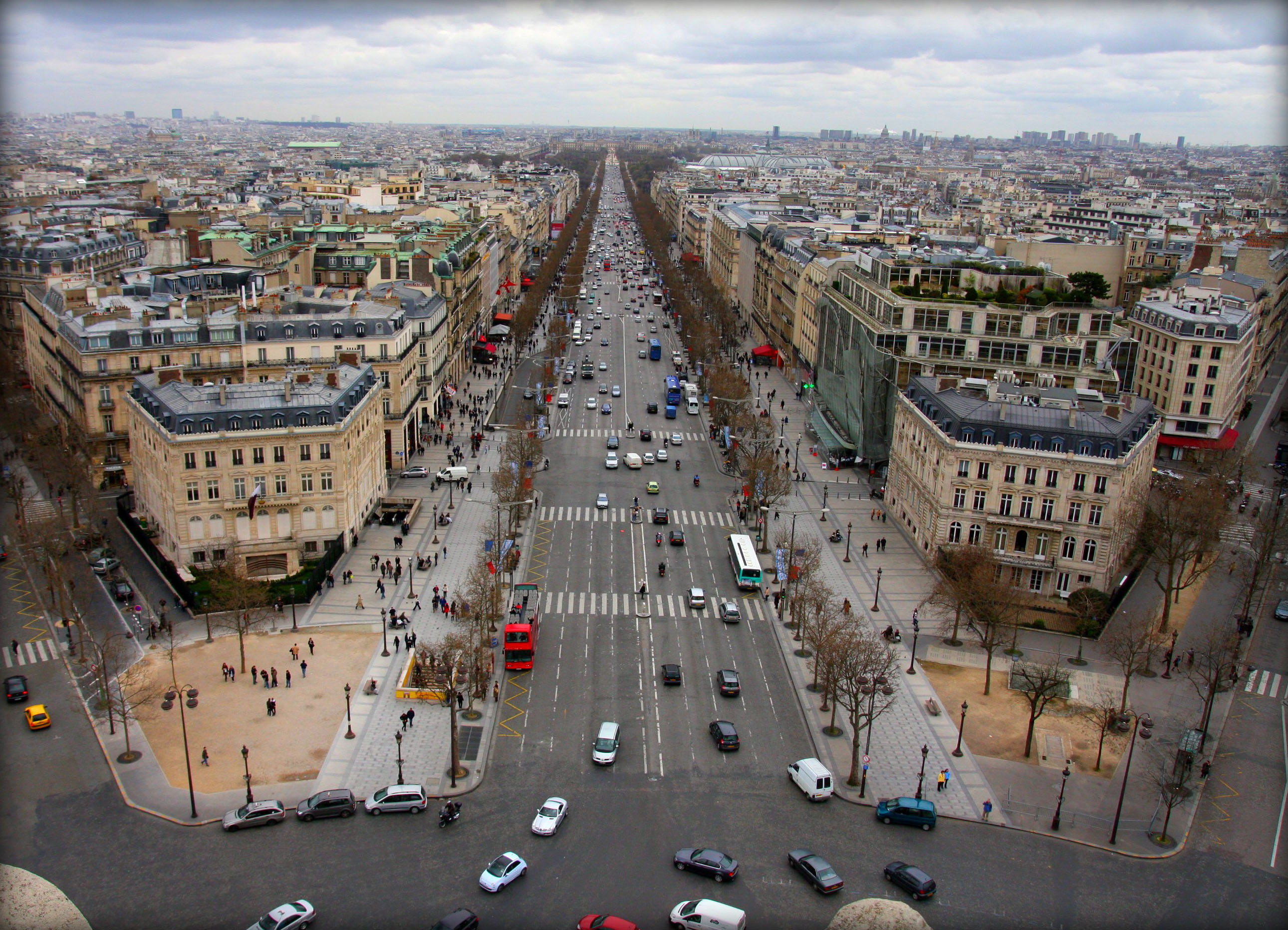 Paris, Avenue des Champs-Élysées vu de l' Arc de Triomphe.